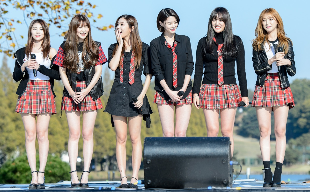 한국어 (조선): 151031 청주 힐링로드 문화축제 - 헬로비너스